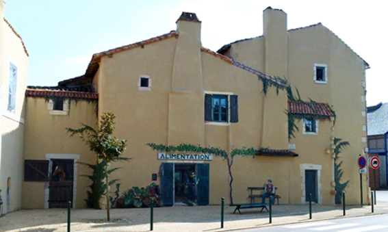 Chaunay grande rue, la fresque d'Armand Langlois remplace les bâtiments anciens. Créé en 2008 à l'initiative de la mairie et du Syndicat Mixte du Pays Civraisien dans le cadre du programme européen Leader+ sur la valorisation des ressources naturelles et culturelles.